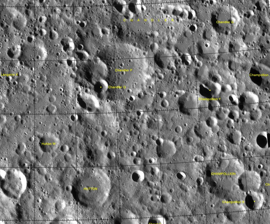 Cráter Champollion (LRO)